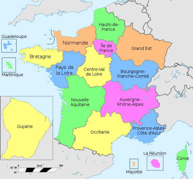 Carte des régions de France avec leurs appellations officielles en 2017